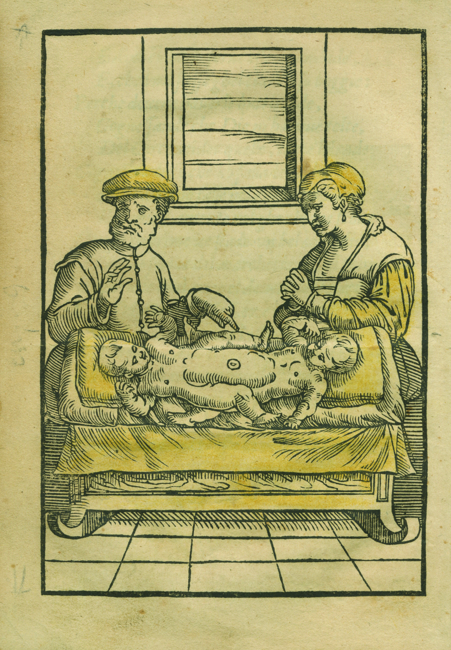 כרוז מודפס, וונציה, 1575 מאוסף משפחת נוימרק